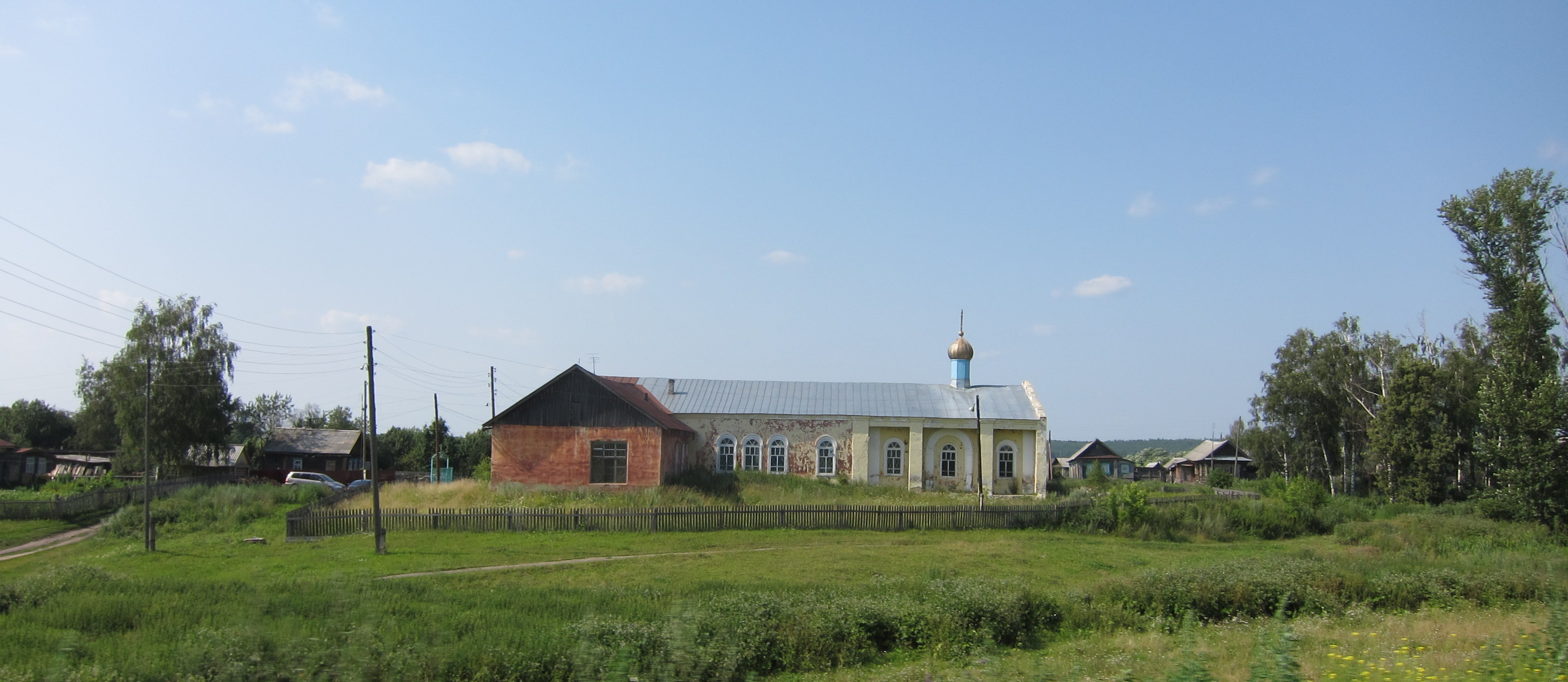 Церковь